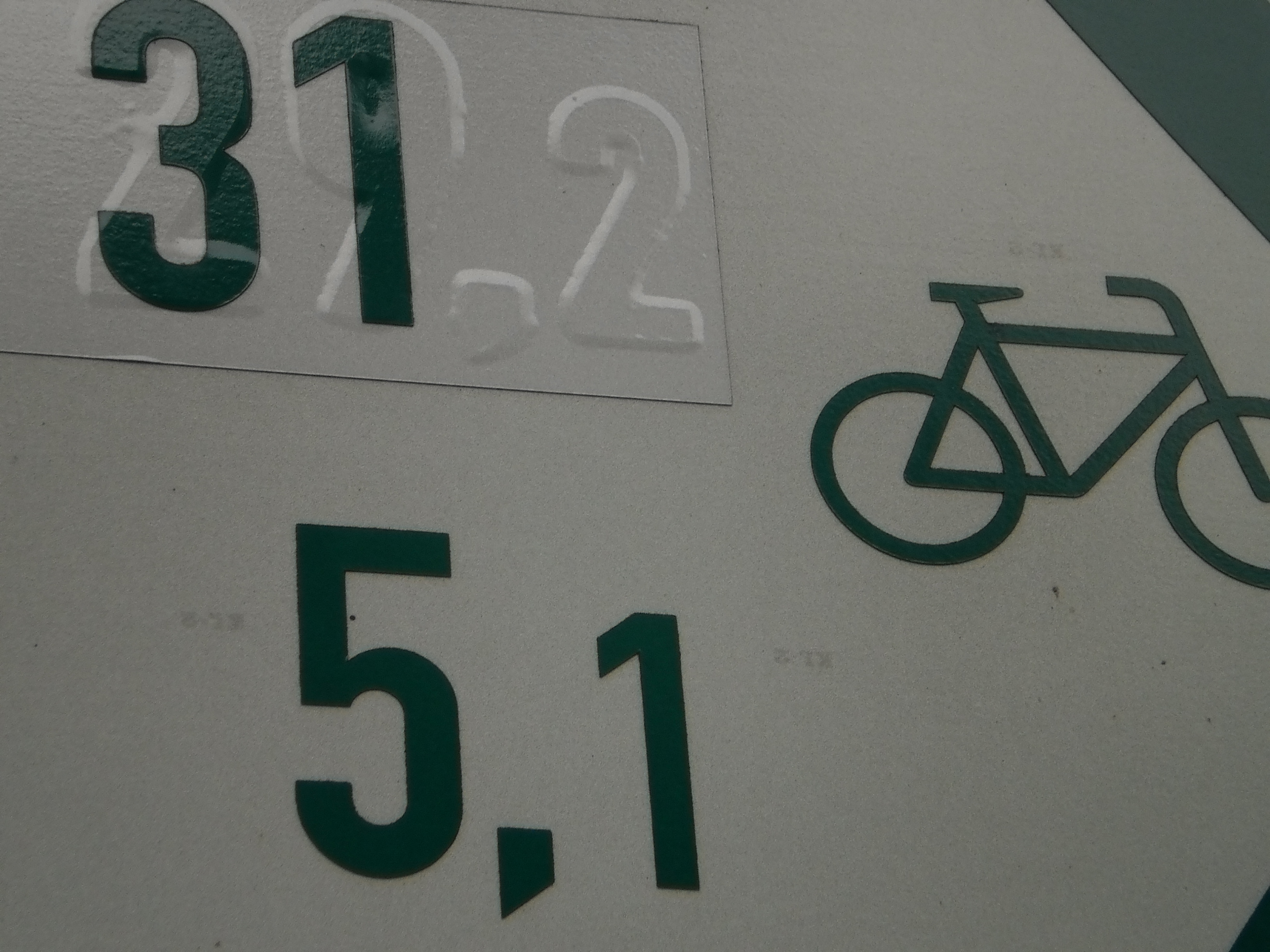 Radverkehrs-Wegweisung am Lahntalradweg im Süden von Marburg: Bei genauem Hinsehen ist die Korrektur der Kilometerangabe für die Wegstrecke bis nach Giessen zu bemerken: Es sind wohl durch den Verlauf der Route entlang der Lahn 31 km statt 29,2 Kilometer Entfernung. Der Fluss schlängelt sich nicht immer geradlinig durch das Lahntal zwischen Marburg und Gießen, vermutlich wurde auch die Anpassung des Streckenverlaufs weg von Hauptverkehrsstrassen berücksichtigt, die auch nach dem Bau der neuen Bundesstrasse 3 nicht für den Autoverkehr gesperrt wurden. Nach Niederweimar auf der selben Radroute sind es nur 5,1 Kilometer von dieser Stelle an der Abzweigung (Am Krekel) in die Aue.